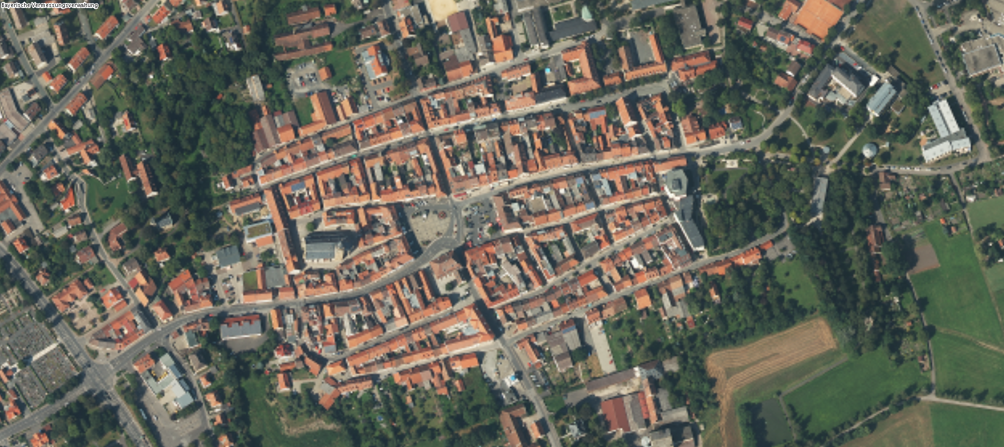 Luftbild Bad Königshofen im Grabfeld 2011